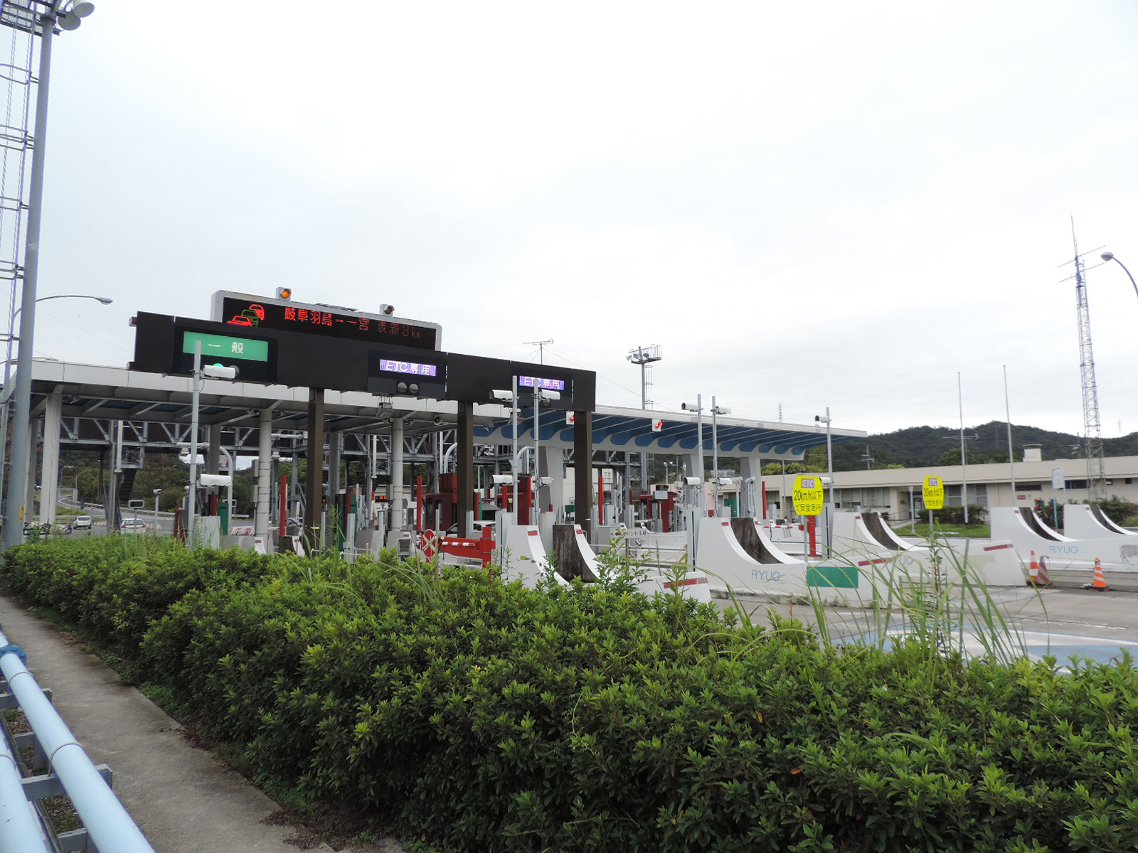 名神竜王インターチェンジ料金所。2017年撮影